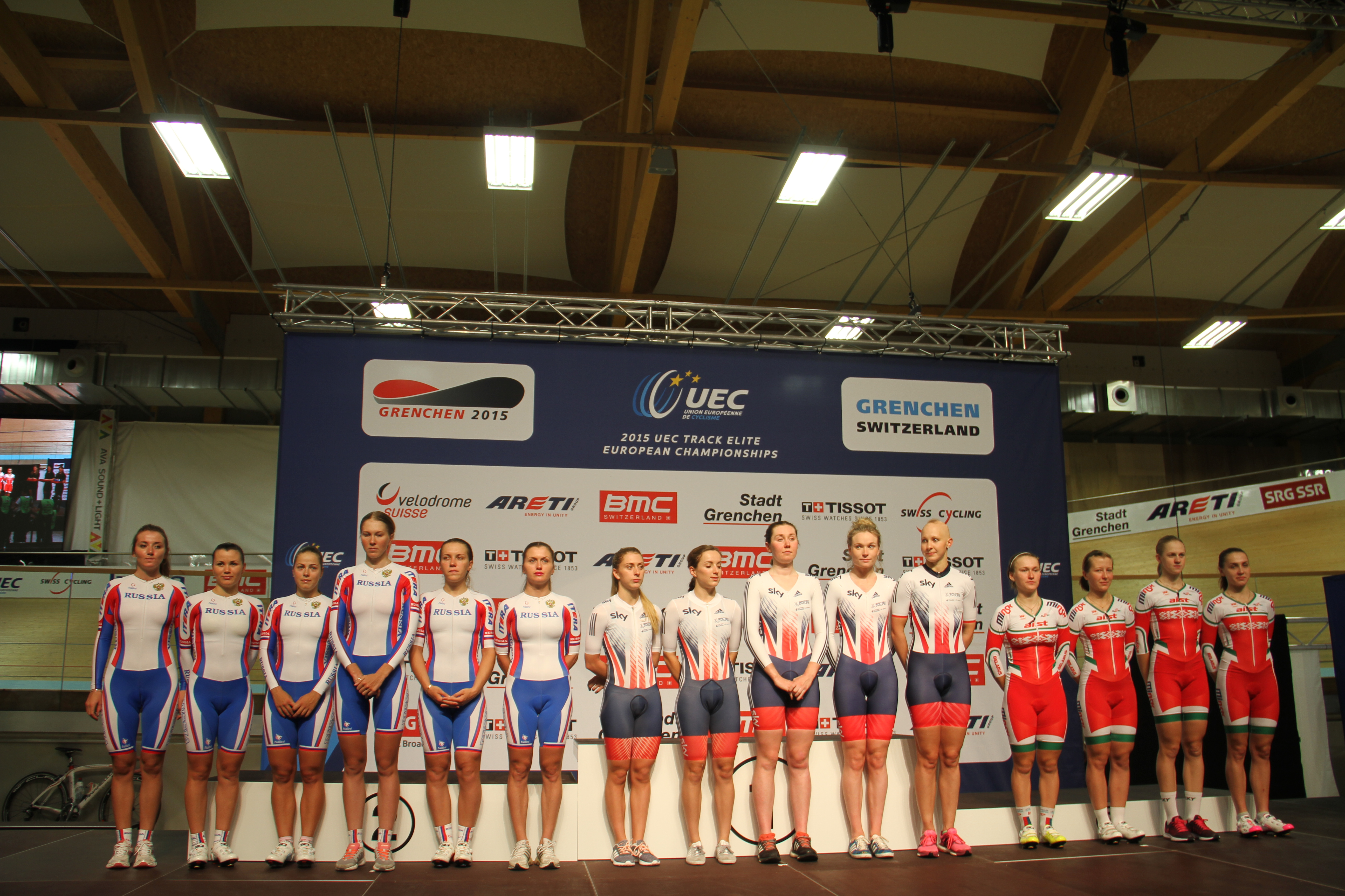 Podium Mannschaftsverfolgung der Frauen, v.l.n.r: Russland, Großbritannien, Weißrussland Template:Supported by Wikimedia Deutschland. right: Ina Savenka